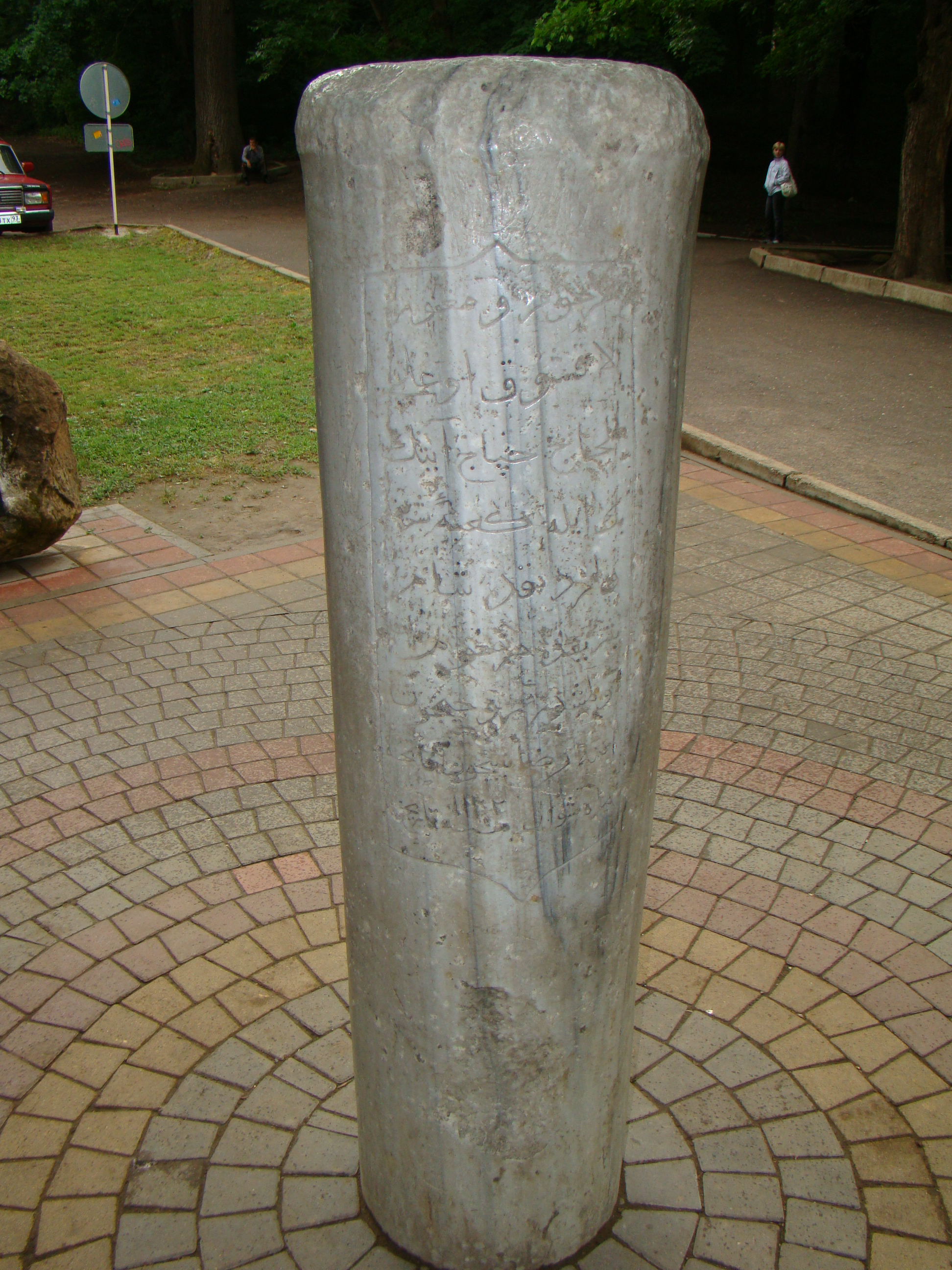 Памятный знак (кенотаф) Хапаче Лакшуке, 1717 г. Город Горячий Ключ, Краснодарский край, Россия